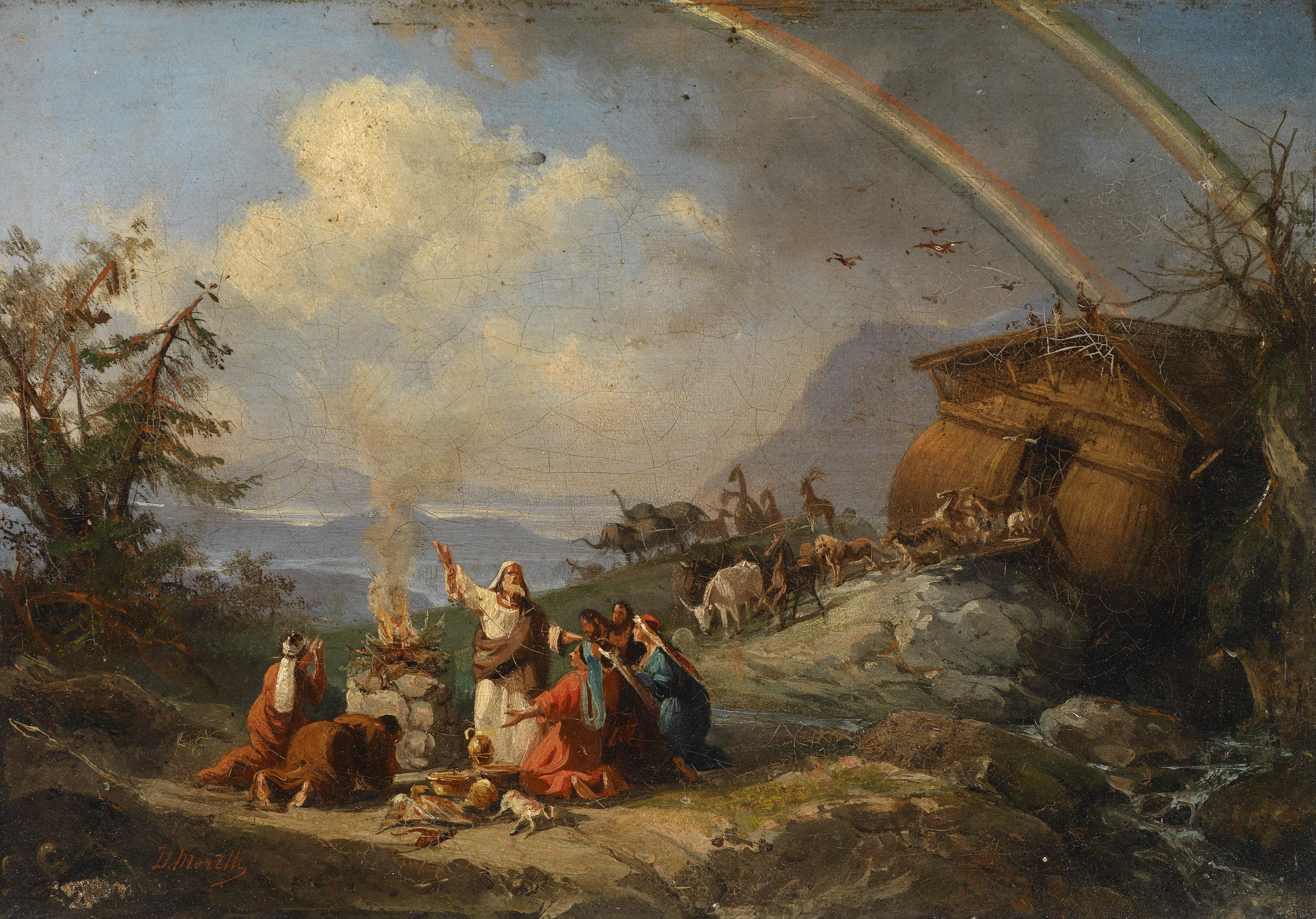 Dankgebet nach Verlassen der Arche Noah, signiert D. Morelli, Öl auf Leinwand, 27,5x 40 cm